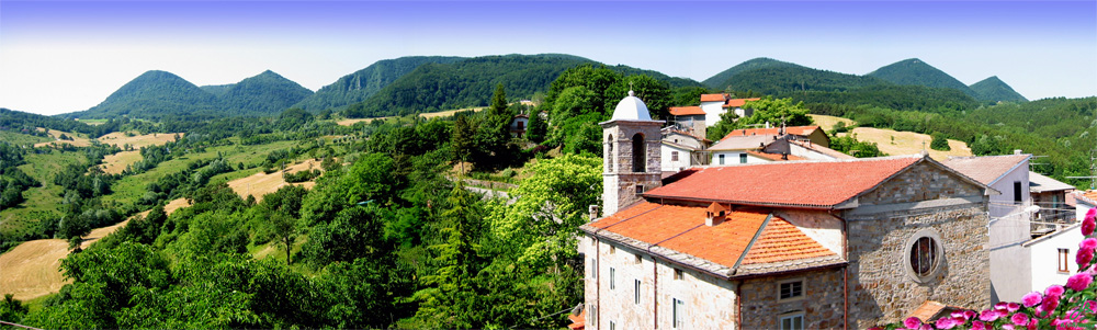 Capanne, vista con i monti